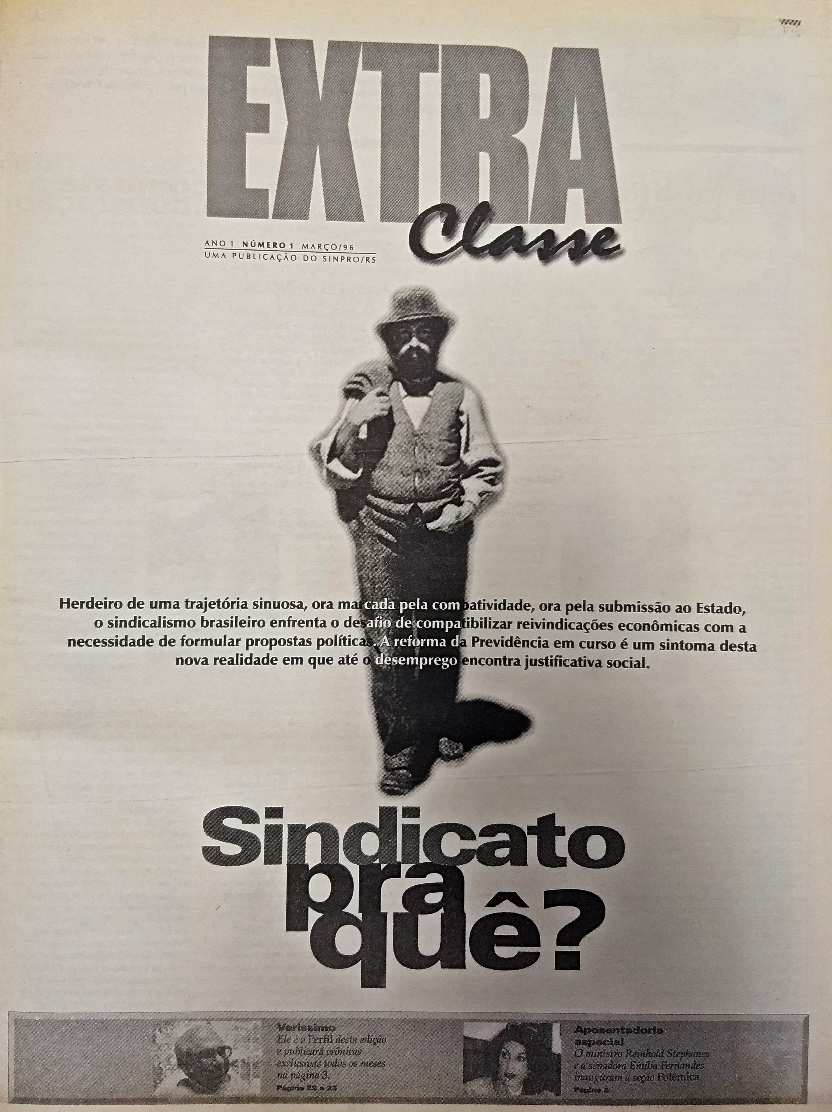 Crédito reprodução: Valéria Ochôa